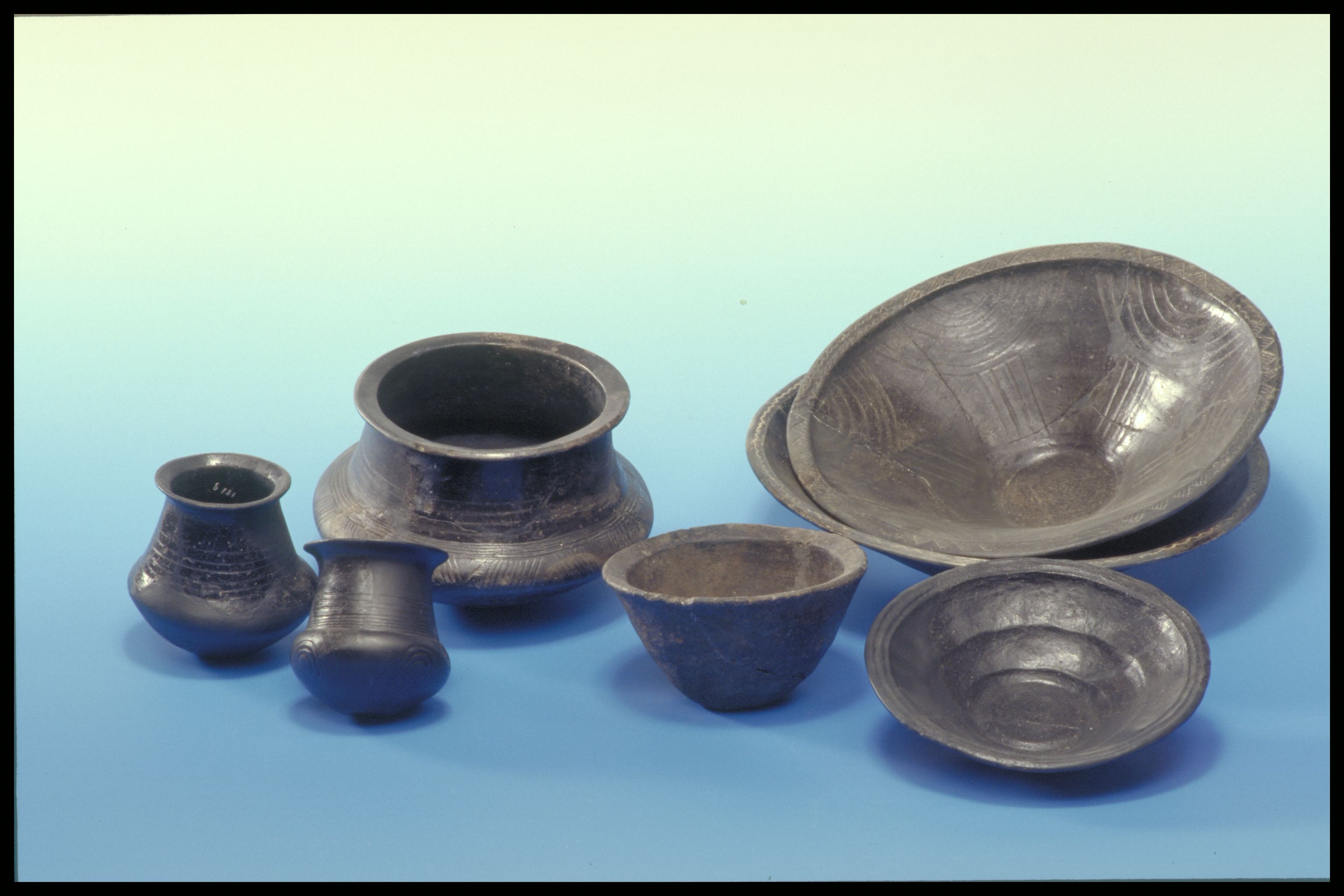 Bildarchiv der Kantonsarchäologie Aargau Archiv Nr. Col./Dig.: 30190 Photo CD Nr Color: 300/85 ImageAccessId: 2640 Objekte: Keramik Fundort: Seengen, Riesi, Seeufersiedlung (Pfahlbau) Aufnahmedatum: 2012 Beschreibung: Fein gearbeitete Schalen und Becher; häufig mit geometrischen Mustern verziert, die mit einer Paste aus verbrannten Knochen gefüllt wurden. Datierung: Spätbronzezeit, ca. 1000 v. Chr. Ausstellungsort: Museum Burghalde Lenzburg Ausgrabung: Reinhold Bosch, 1923-1925